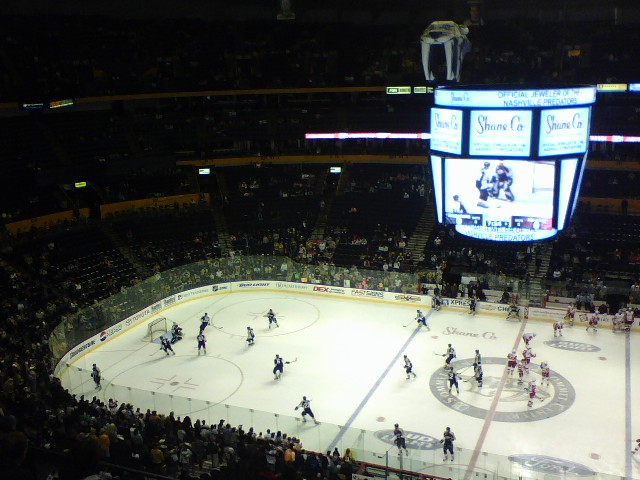 Intérieur du Sommet Center le 23 novembre 2007. Match opposant les Predators de Nashville aux Red Wings de Detroit. Source Auteur : yearginsm